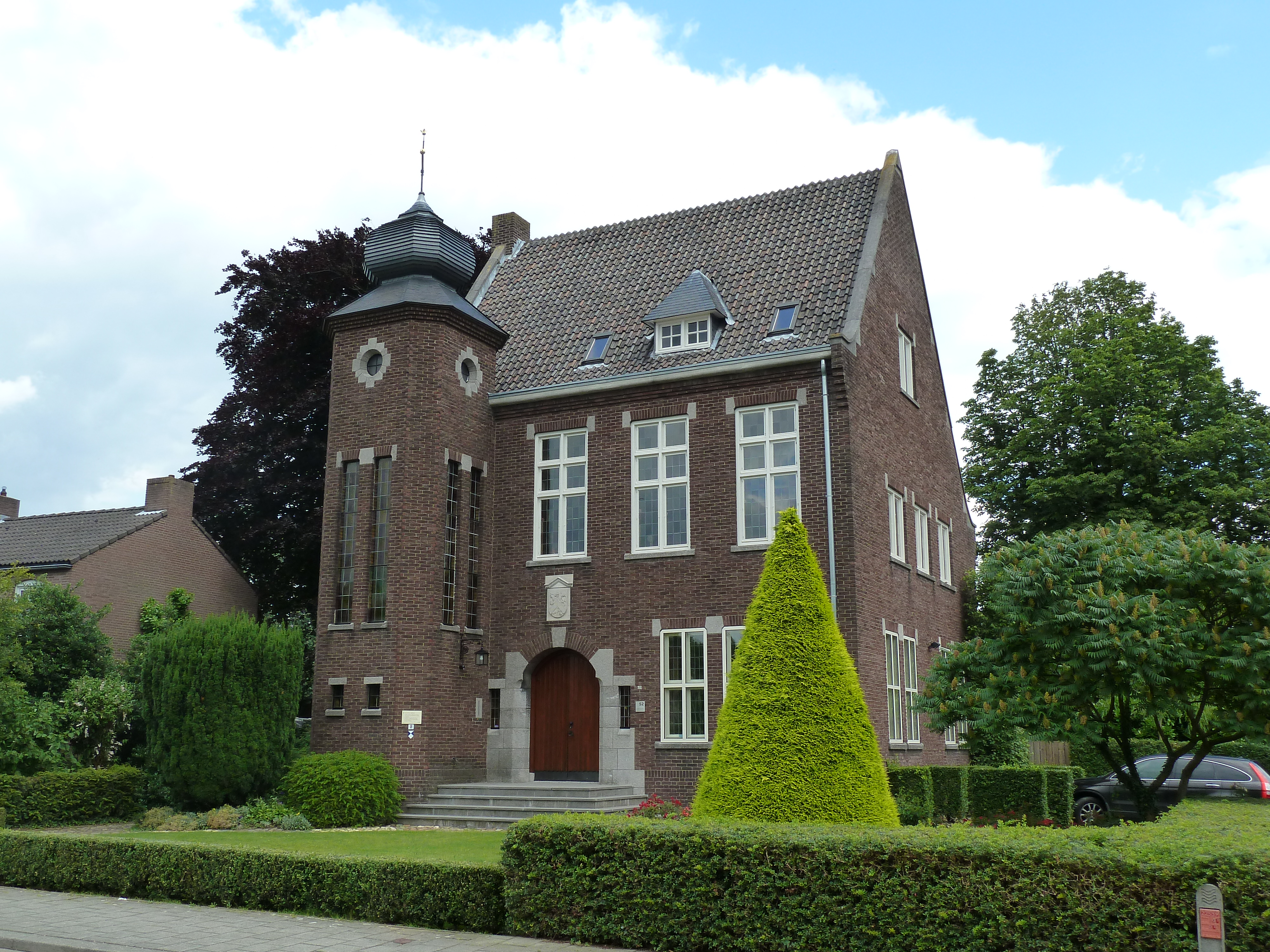 Raadhuisstraat 52, Urmond, Limburg, Nederland